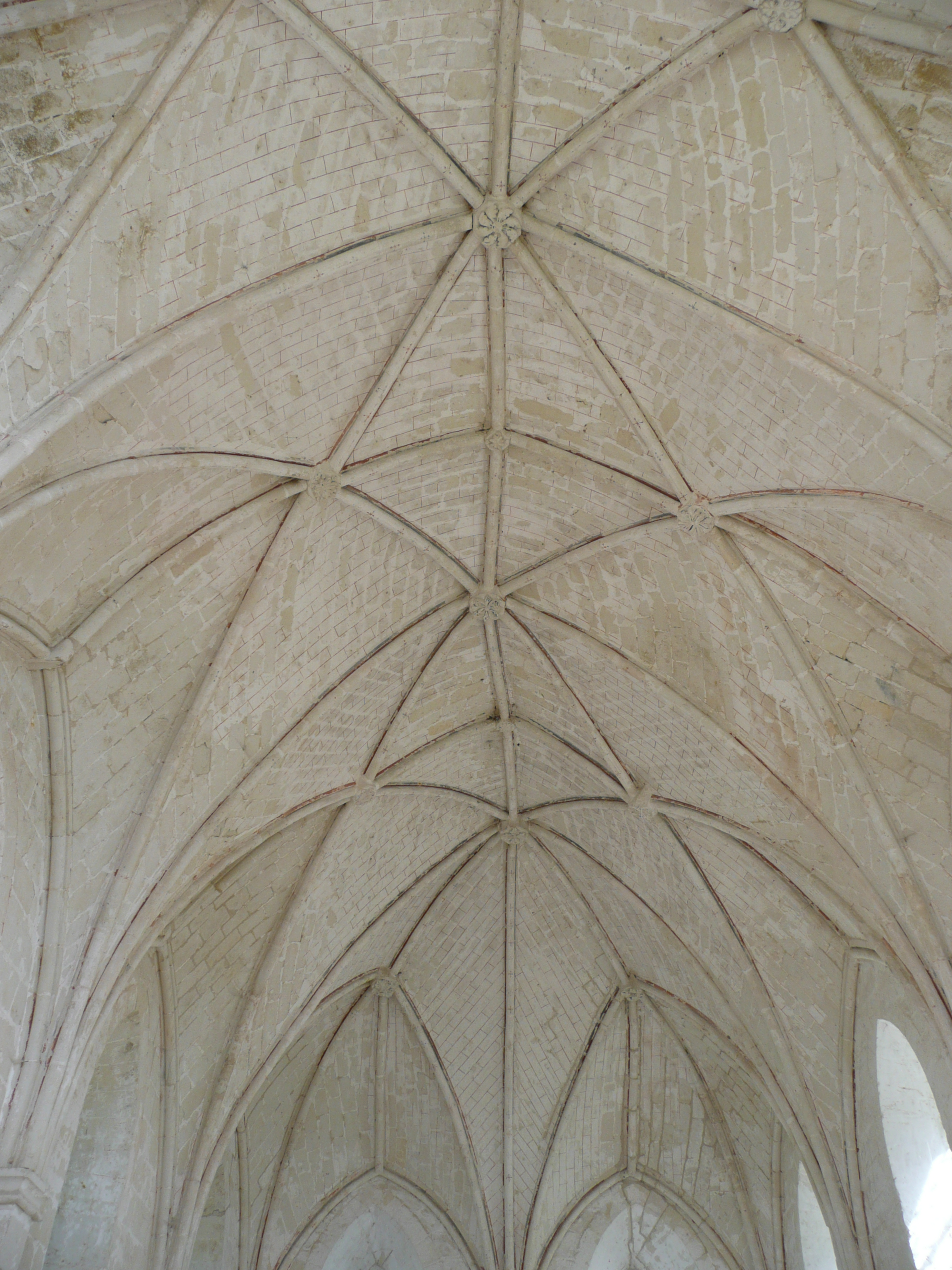 Dénezé sous Lude - Abbaye de la Boissière - Chapelle This building is en partie classé, en partie inscrit au titre des Monuments Historiques. .